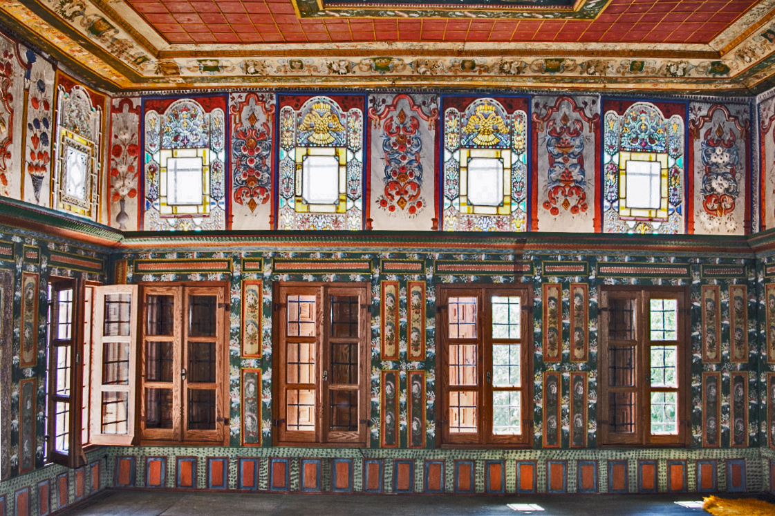 Εσωτερικός οντάς από το Αρχοντικό της Πούλκως (Σιάτιστα)